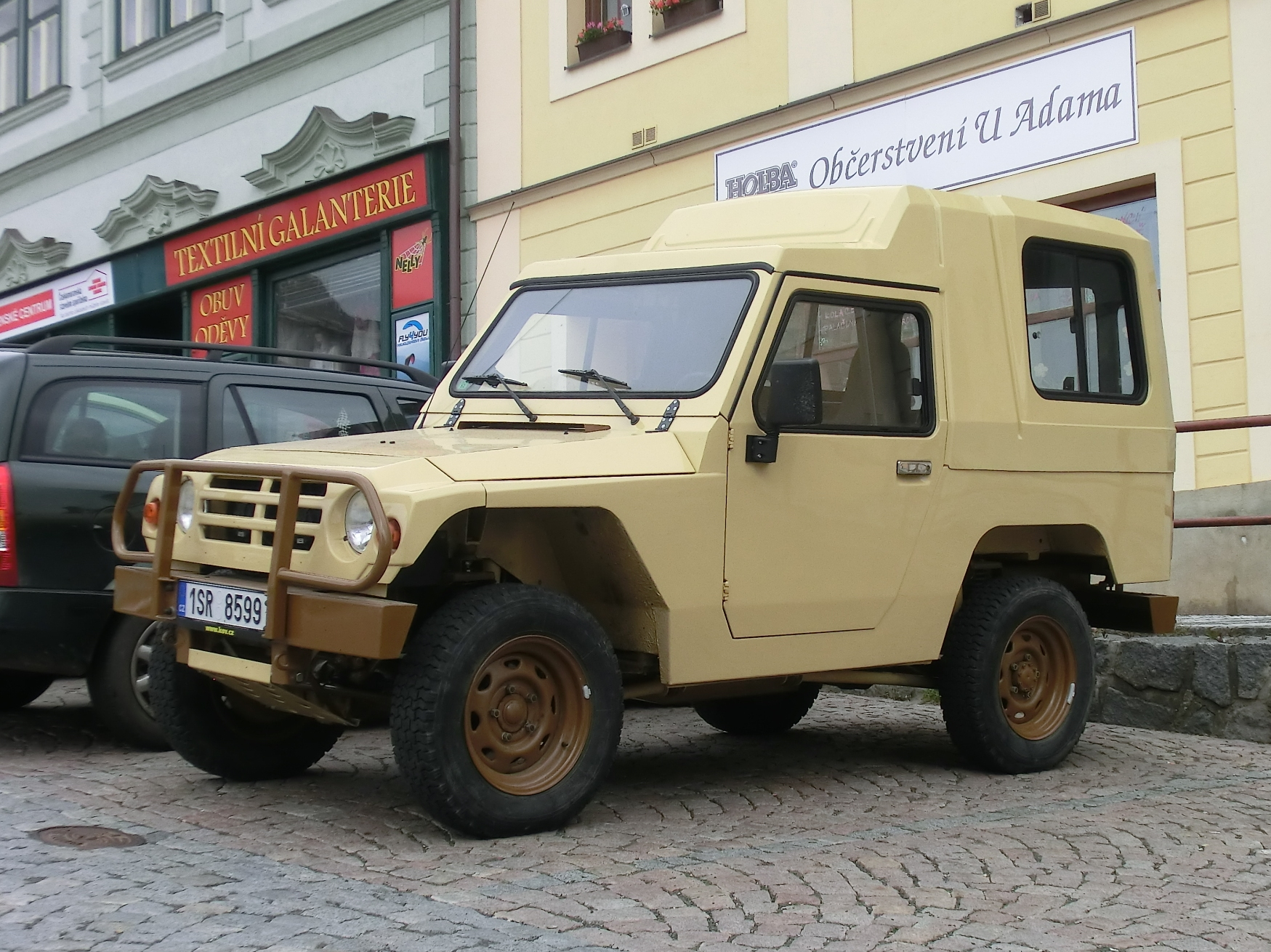 Terénní automobil Avia A11 (licence Auverland A3) zavítala do Jilemnice u příležitosti akce Tatra v Českém ráji 2014, soutěže se však neúčastnila.